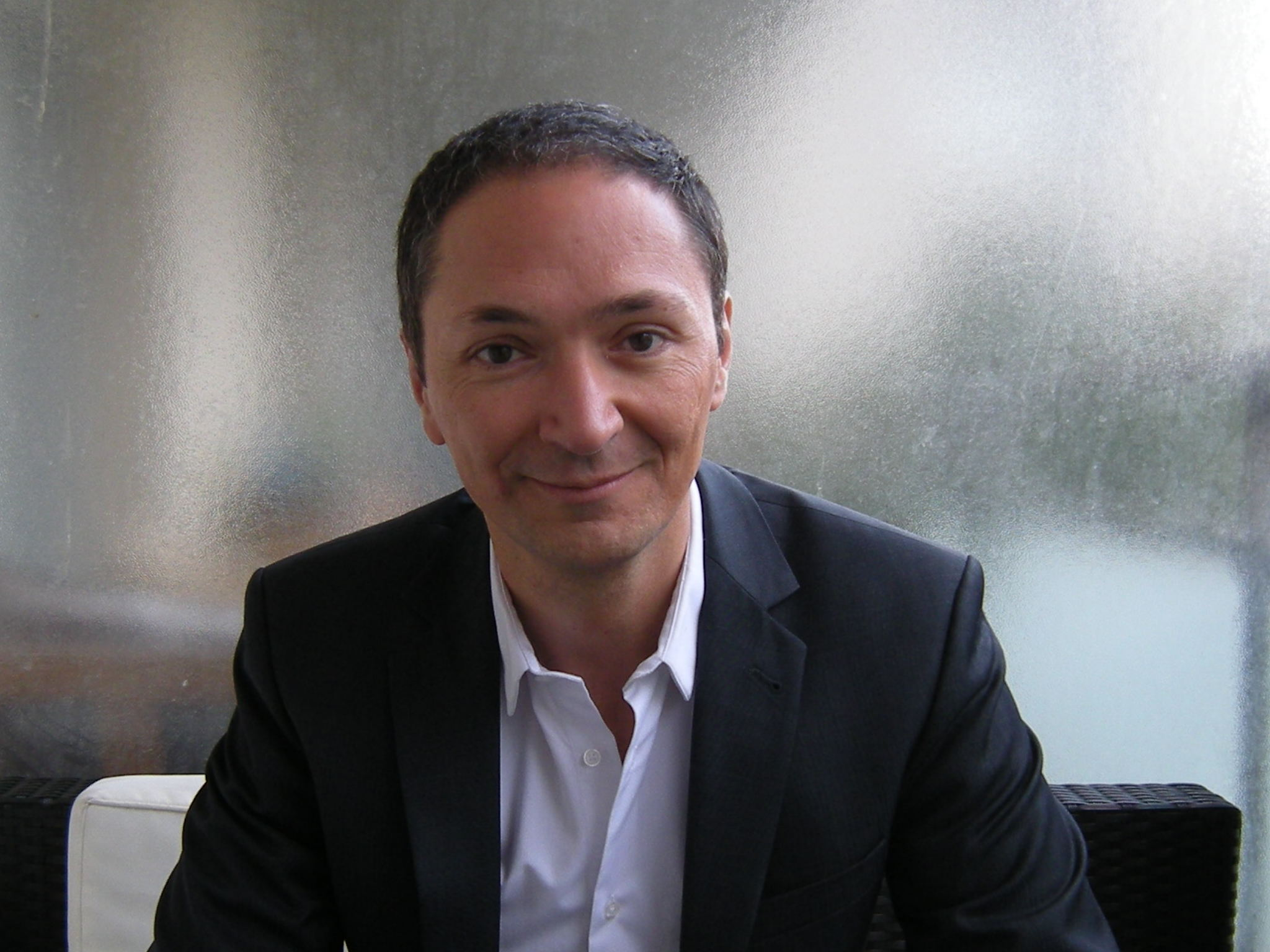 Philippe Verdier